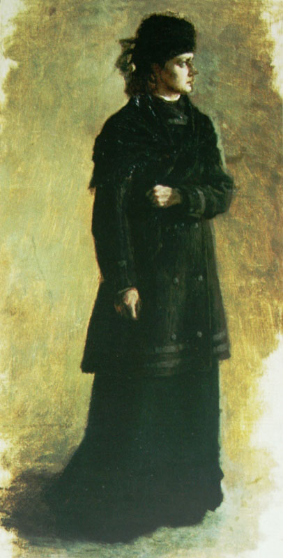 Н. А. Ярошенко. Террористка. Этюд к картине «У Литовского замка» 1879.